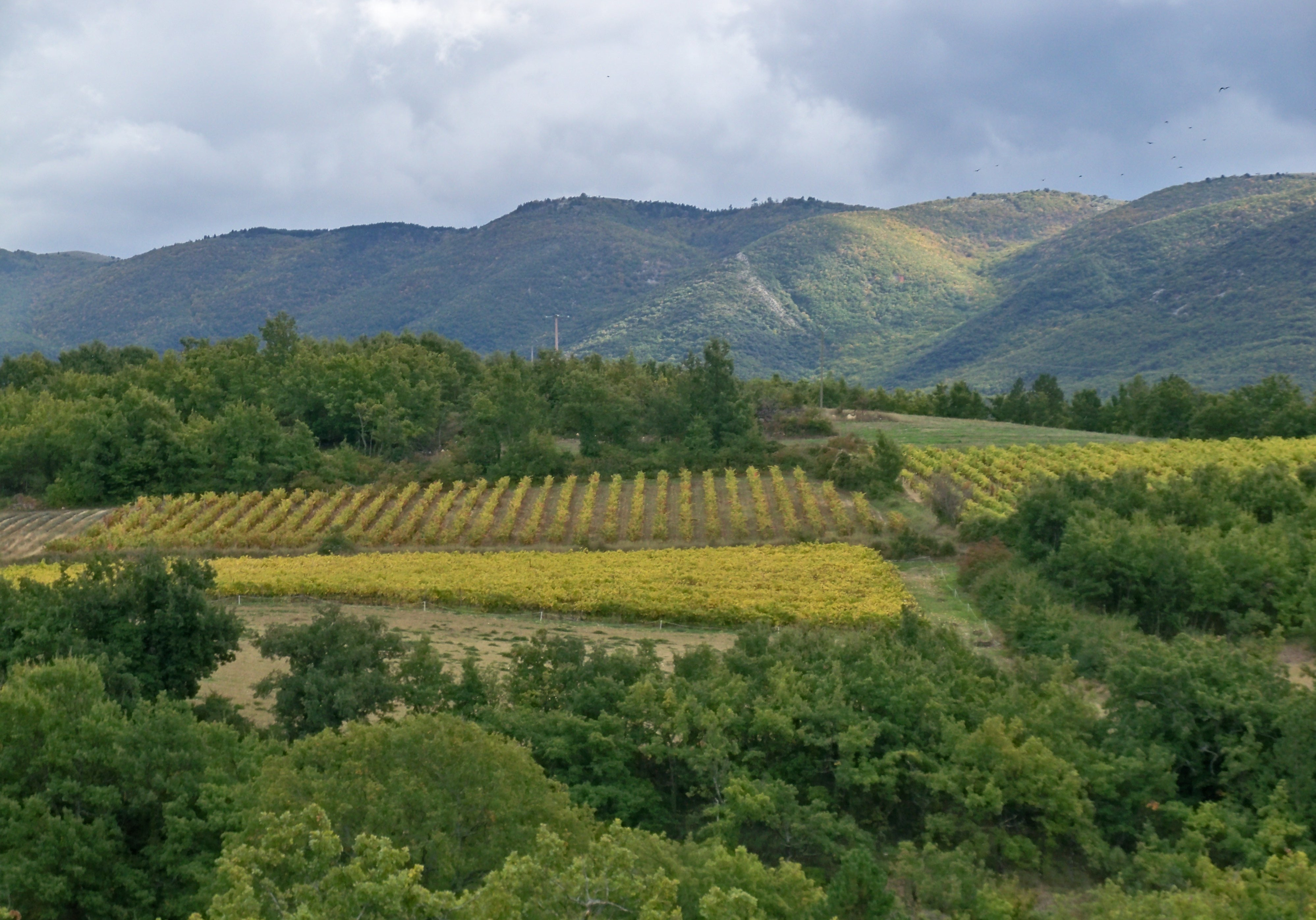 Vigne en Luberon, Vaucluse, France